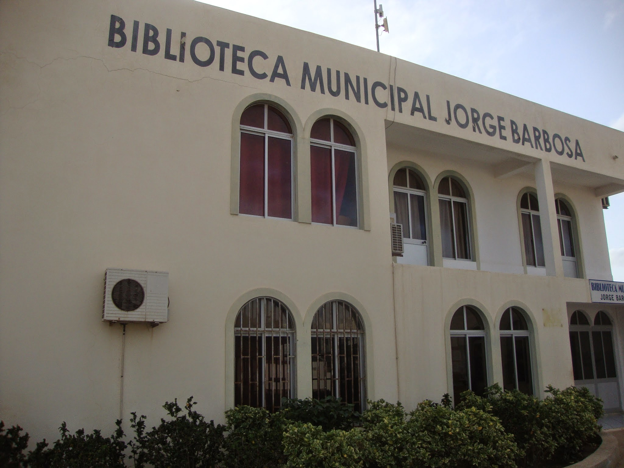 Biblioteca Municipal Jorge Barbosa, do município da Ilha do Sal.